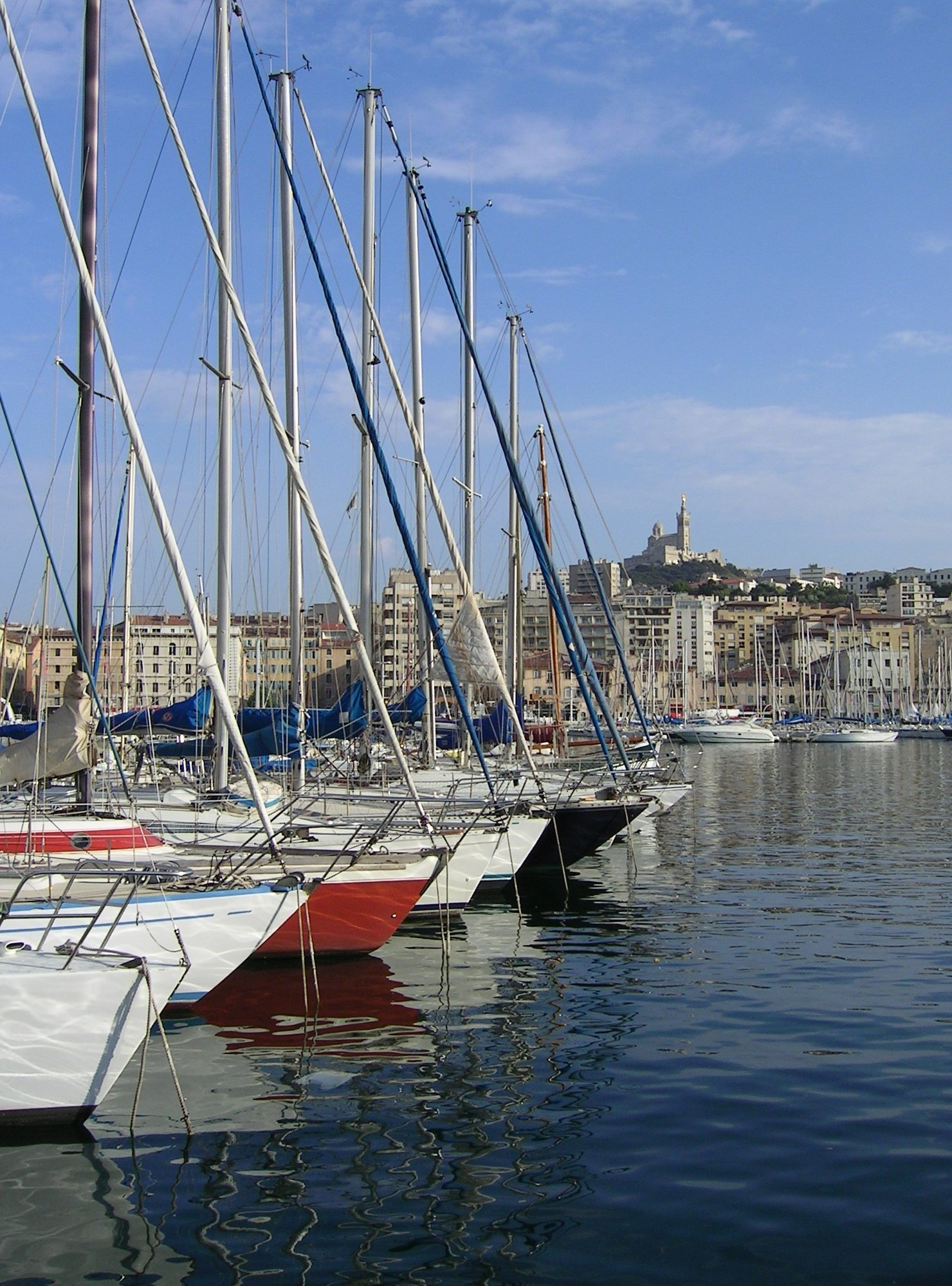 Description: Ships in the Old Port of Marseille, France. In the background, the Basilique Notre Dame de la Garde Source: own picture (Thomas Rosenau, User:Pumbaa80) Date: see metadata section below Other versions: Image:Vieux port de Marseille 2.jpg Description: Le vieux port de Marseille. Au fond: Notre-Dame de la Garde Source: Image prise par Thomas Rosenau (User:Pumbaa80) Date: voir ci-dessous (section «Metadata») Autres versions: Image:Vieux port de Marseille 2.jpg